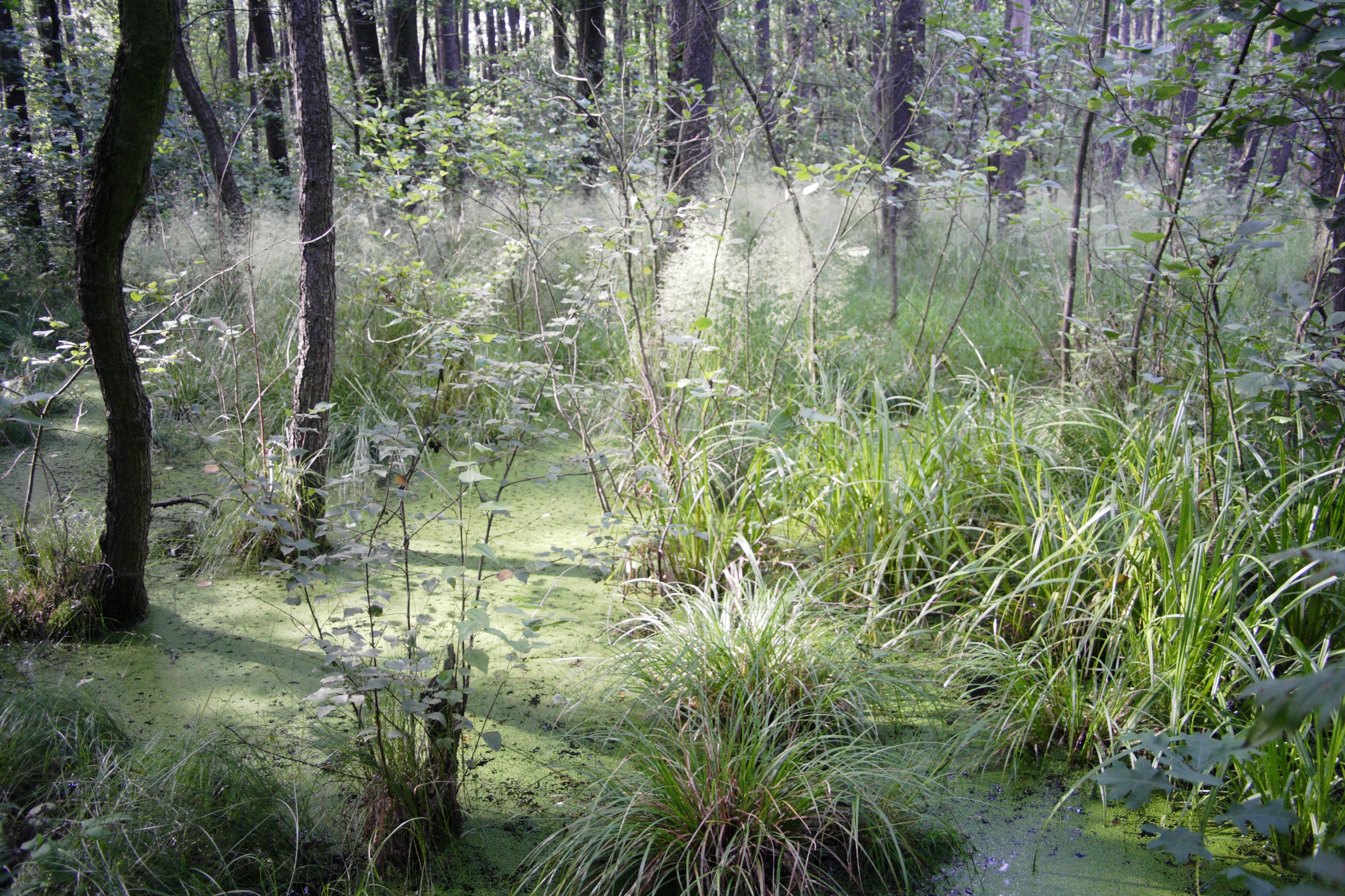 Dübener Heide - Grünaer Wald - L 05